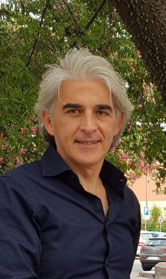 Francesco Tanasi, giudirista italiano, segretario nazionale del codacons